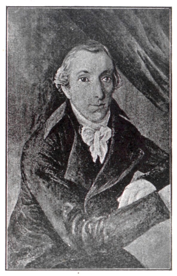 Portrét Ignaze Röslera (1765-1837)